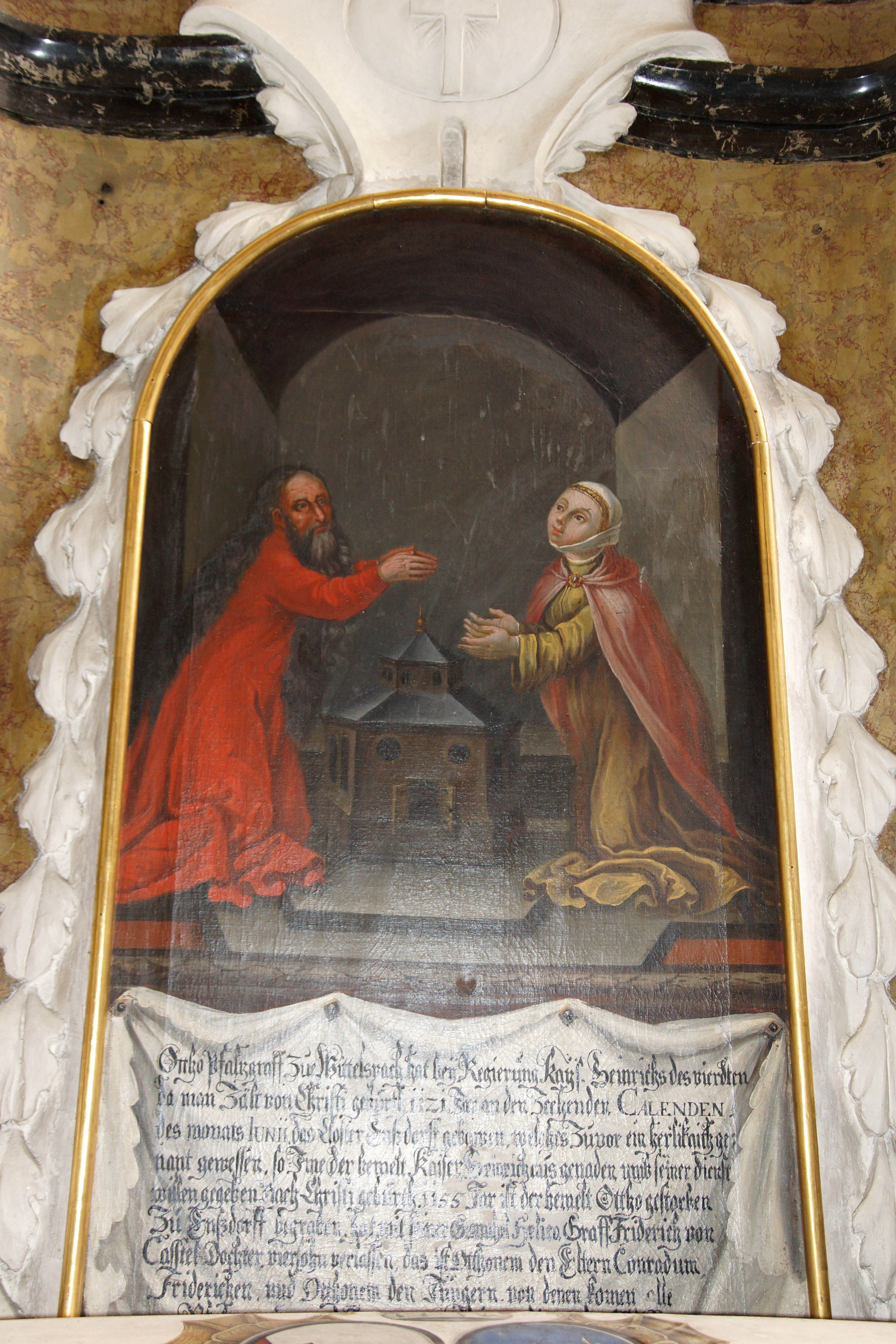 Die Klosterkirche St. Jakob im Oberpfälzischen Ensdorf